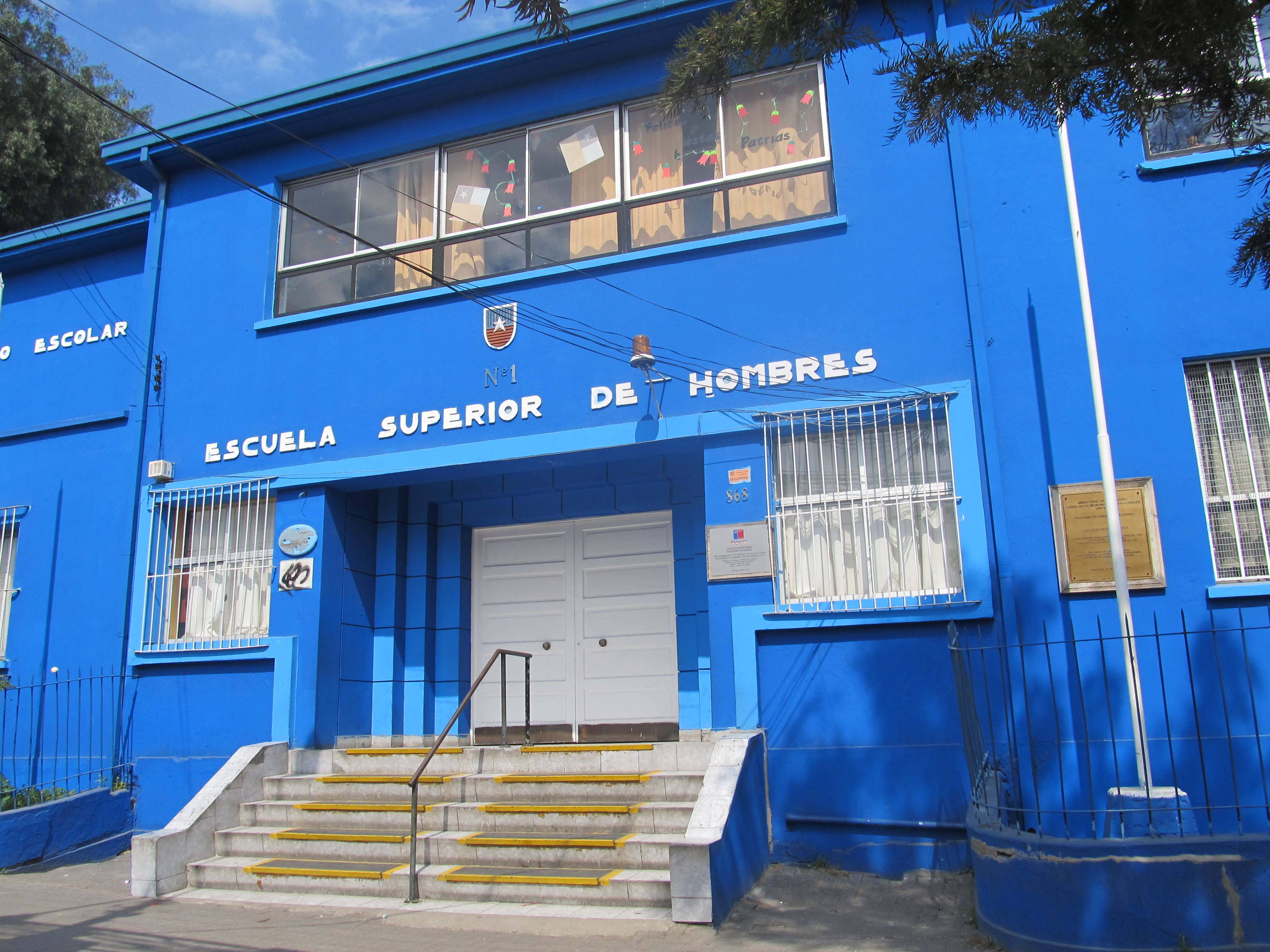 Colegio Moisés Mussa, Rancagua.